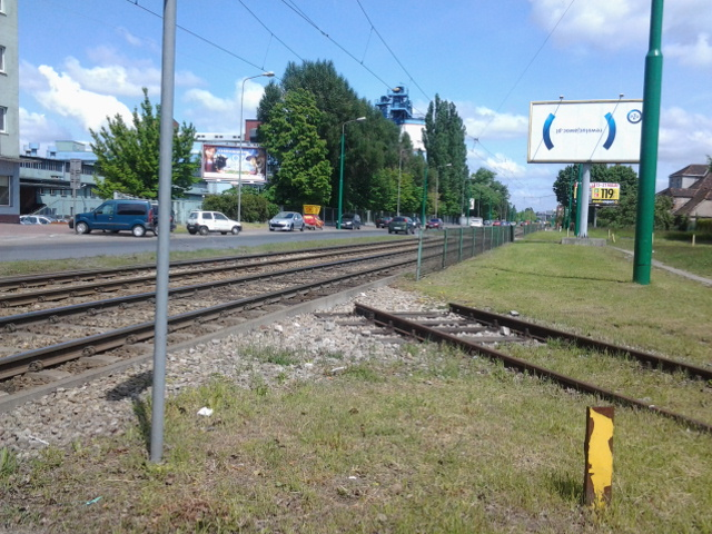 Odcięty tor ex Średzkiej KD na Starołęce w Poznaniu.